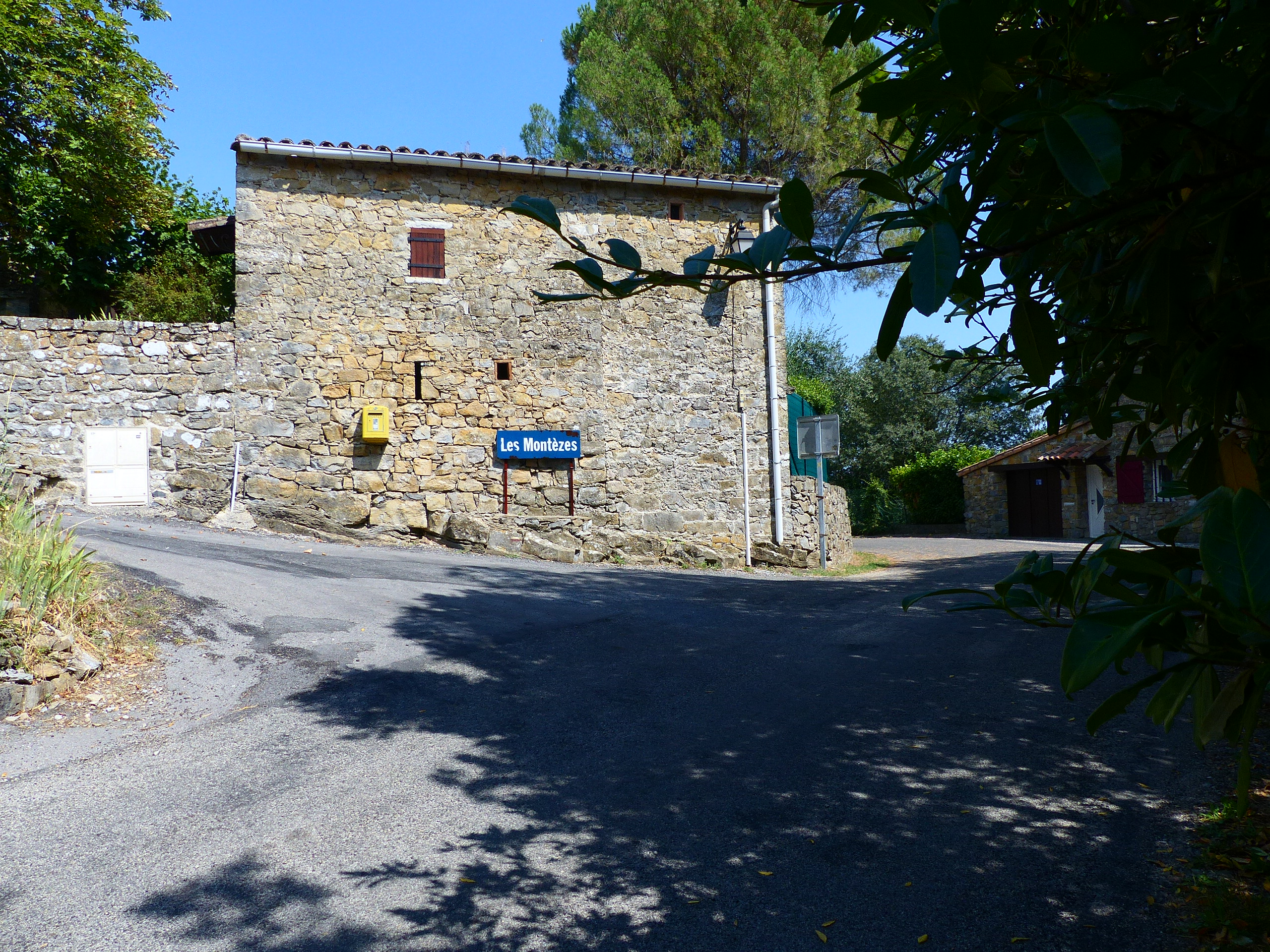 Les Montèzes, hameau de Monoblet (Gard). La photo est prise depuis la départementale D185.